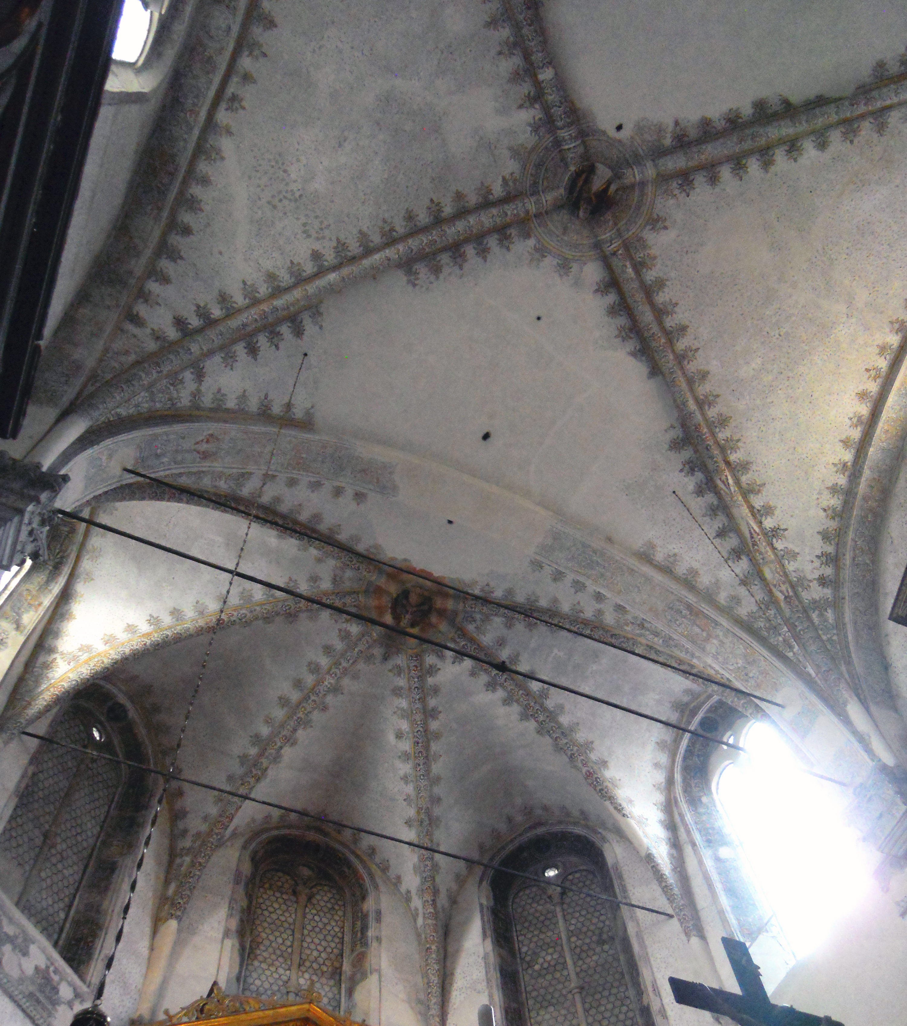 Duomo vecchio (Brescia) volta del presbiterio (Bernardino da Martinengo e Gasparo Cairano, fine XV sec)